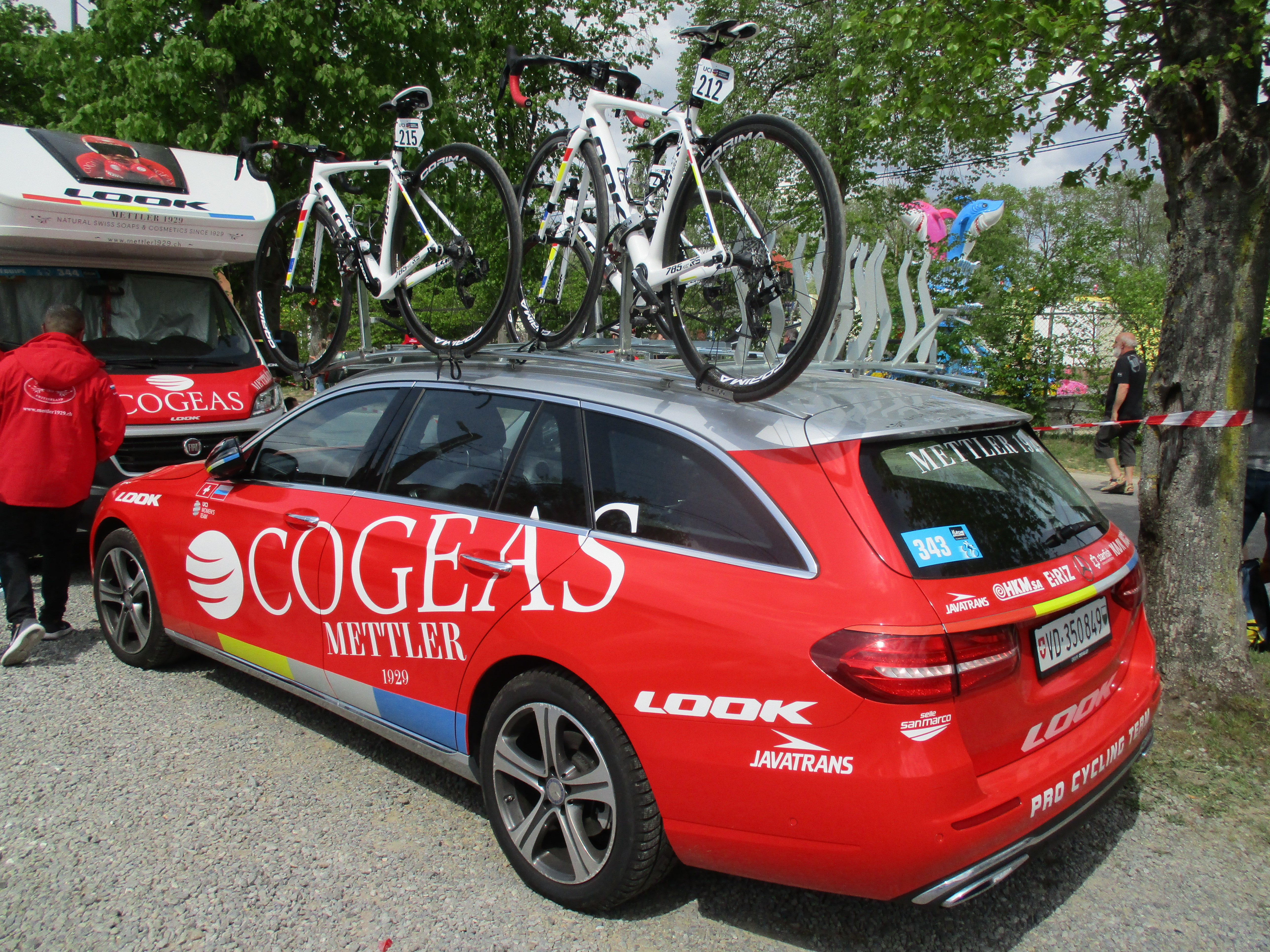 Waalse Pijl 2019 voor vrouwen op de Mur de Huy